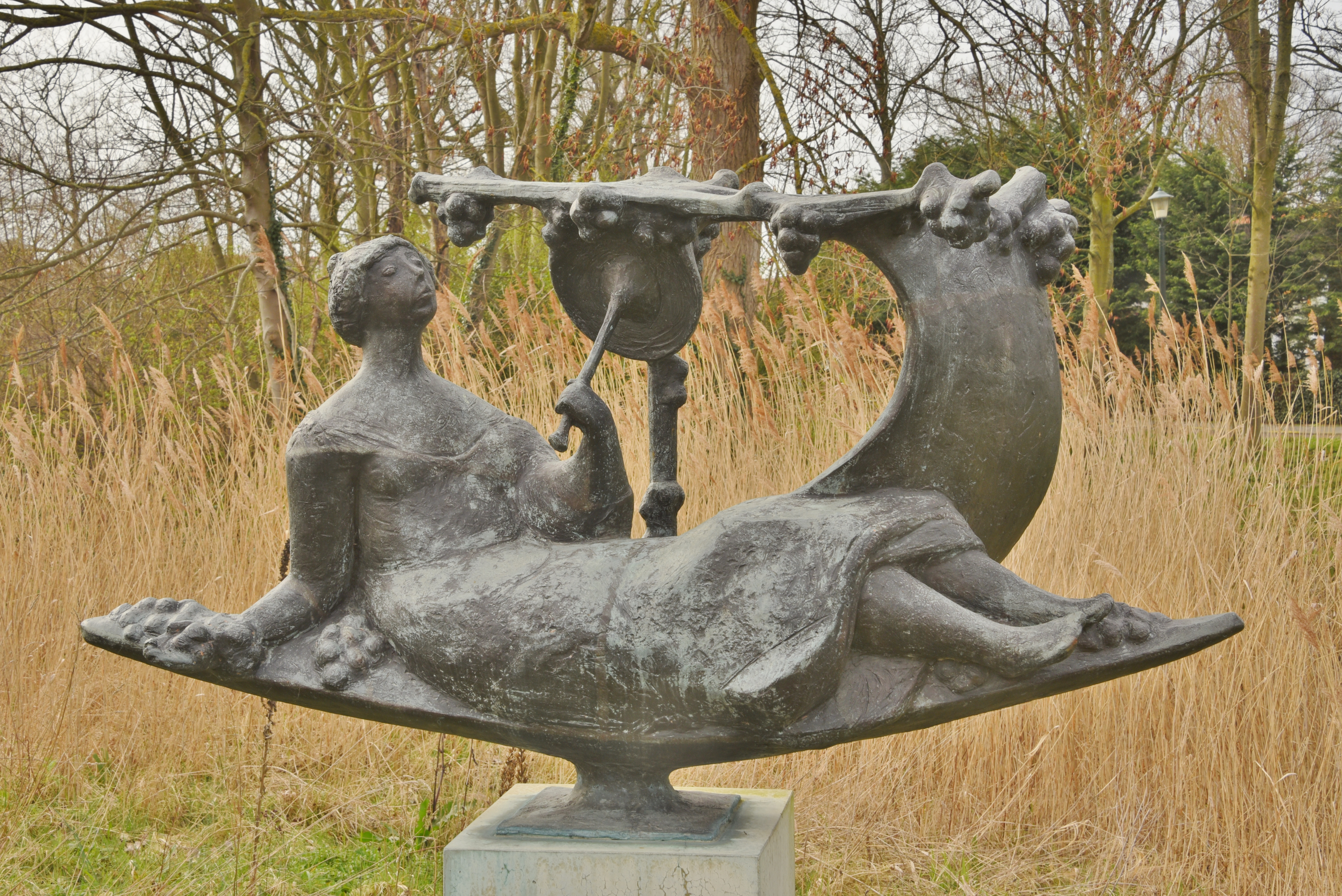 Skulptur Römische Göttin Flora von Bram Roth